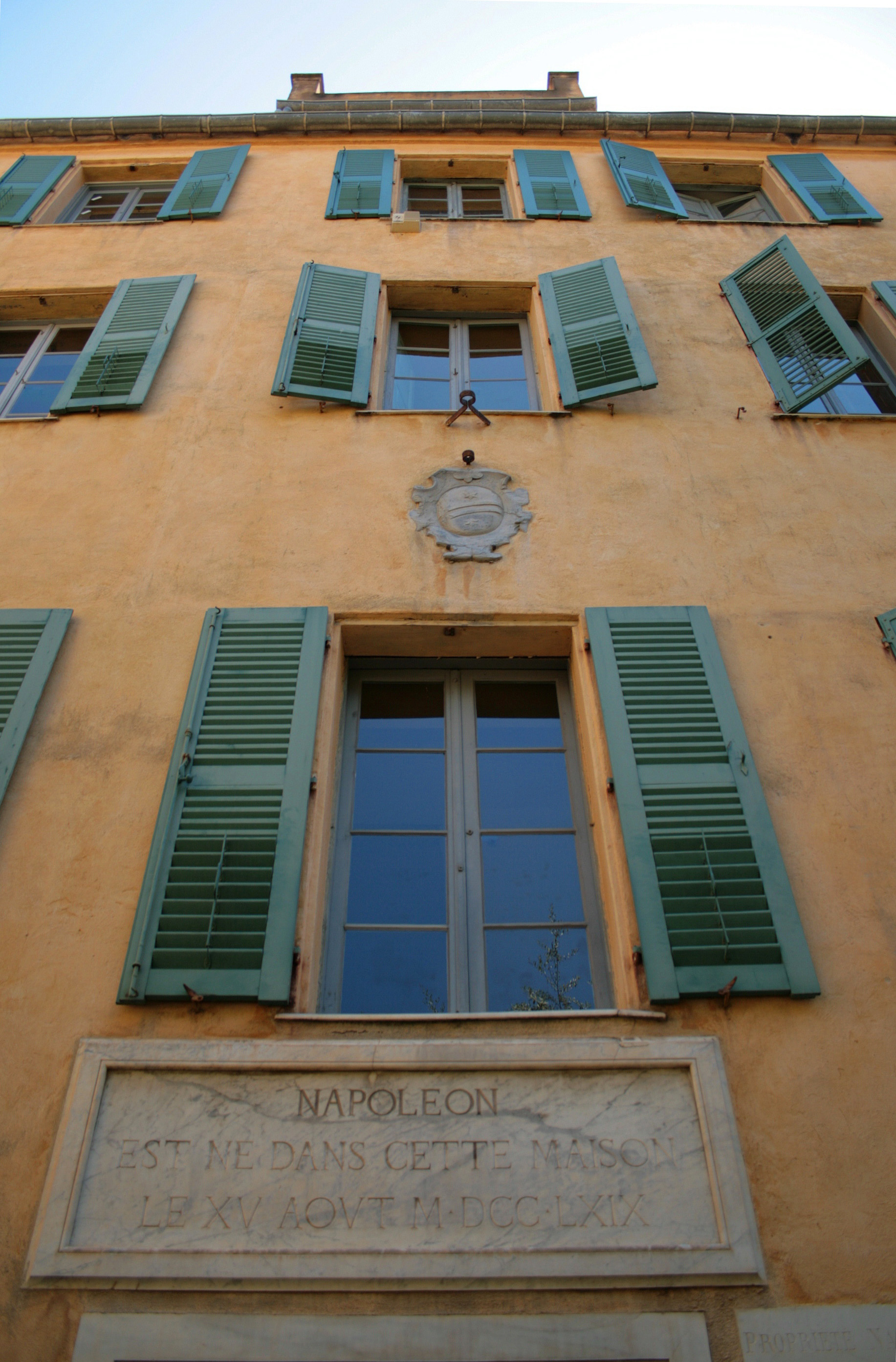 Ajaccio France, rue Saint-Charles - Façade de la maison Napoléon Bonaparte.